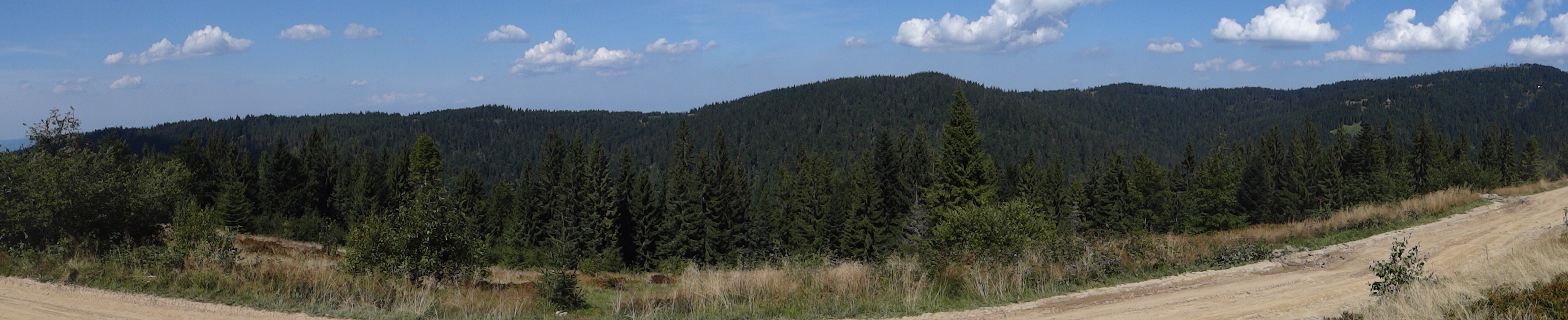 Polana Bukowina i widok na grzbiet Średniego Wierchu